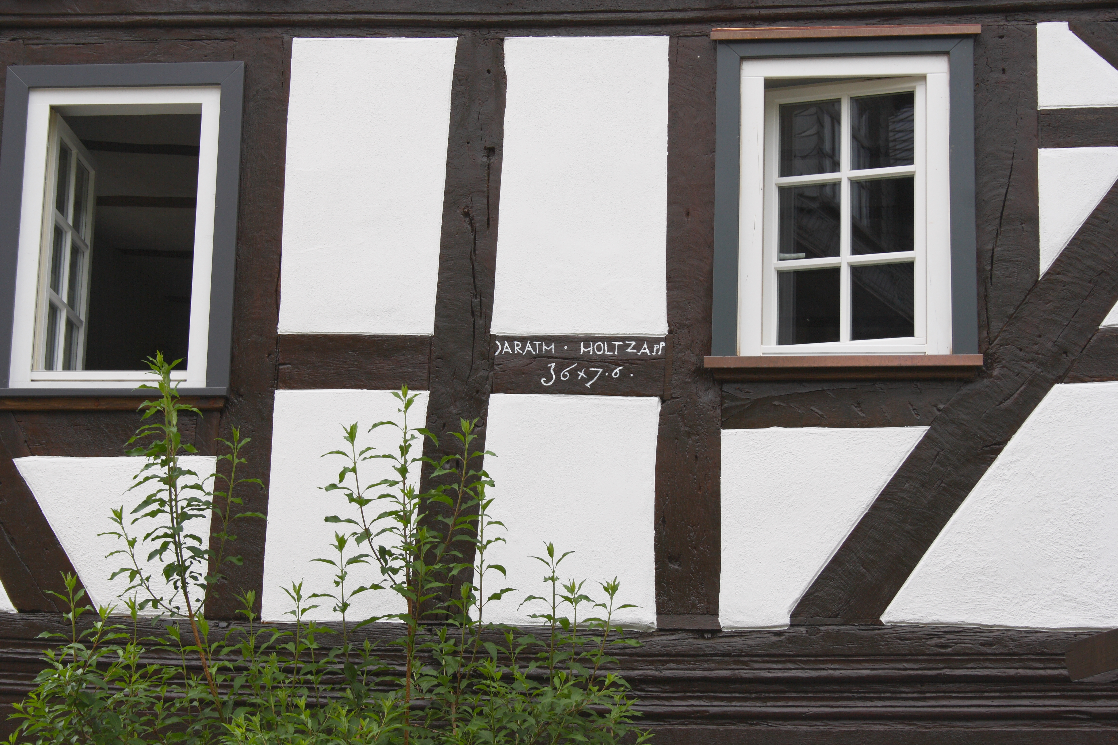 Haus Belzgasse 3 in Braunfels im Lahn-Dill-Kreis (Hessen)